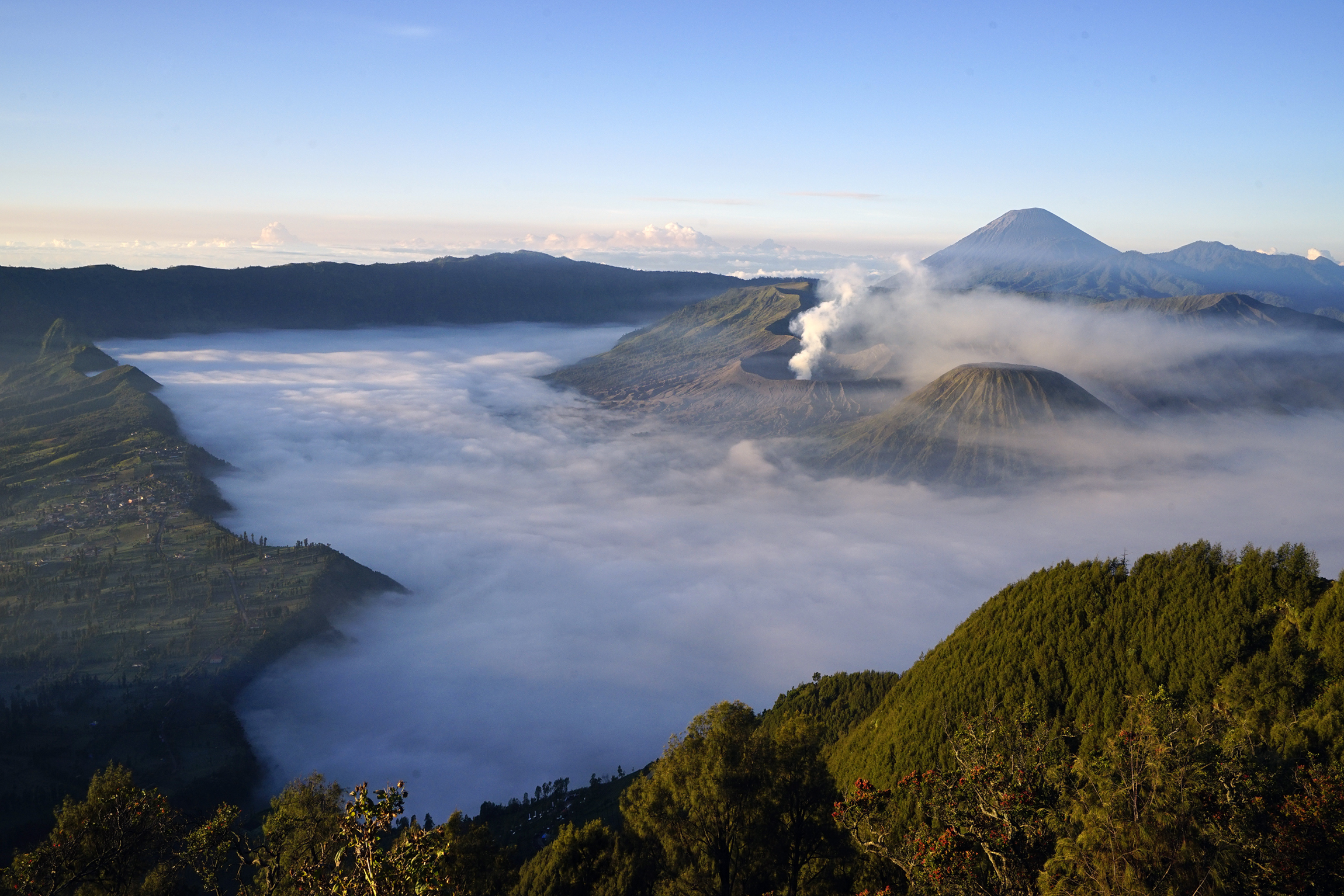 Banyak tempat untuk menikmati keindahan Gunung Bromo salah satunya dari Penanjakan, tapi jika cuaca kurang bersahabat mungkin keindahannya akan kurang terasa sempurna.